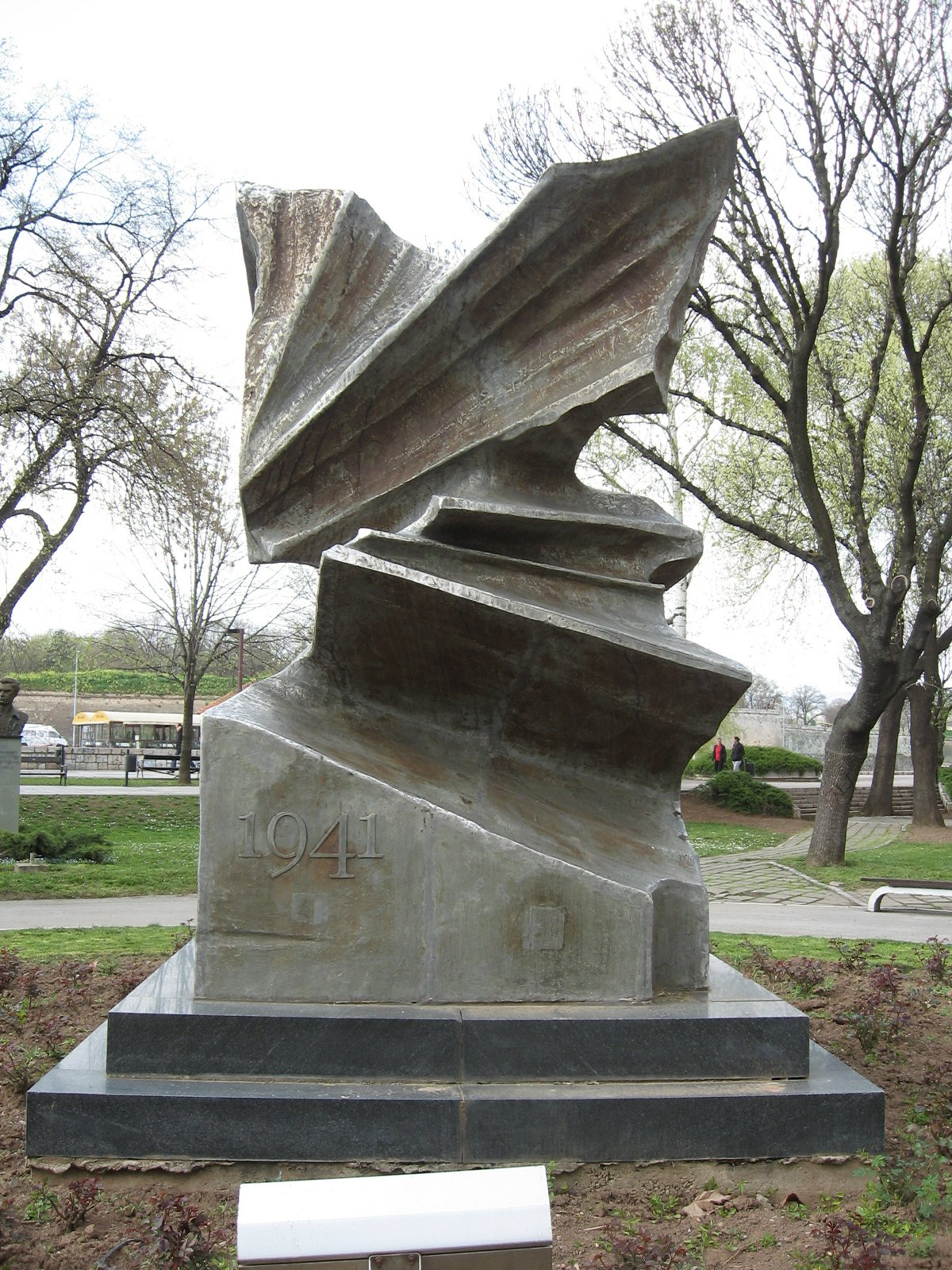 Spomenik u Nišu. Snimljeno u aprilu 2010. Споменик је подигнут као сећање на догађај из 1941. године када партизан Александар Војиновић извршио бомбашки напад у Хотелу „Парк“.